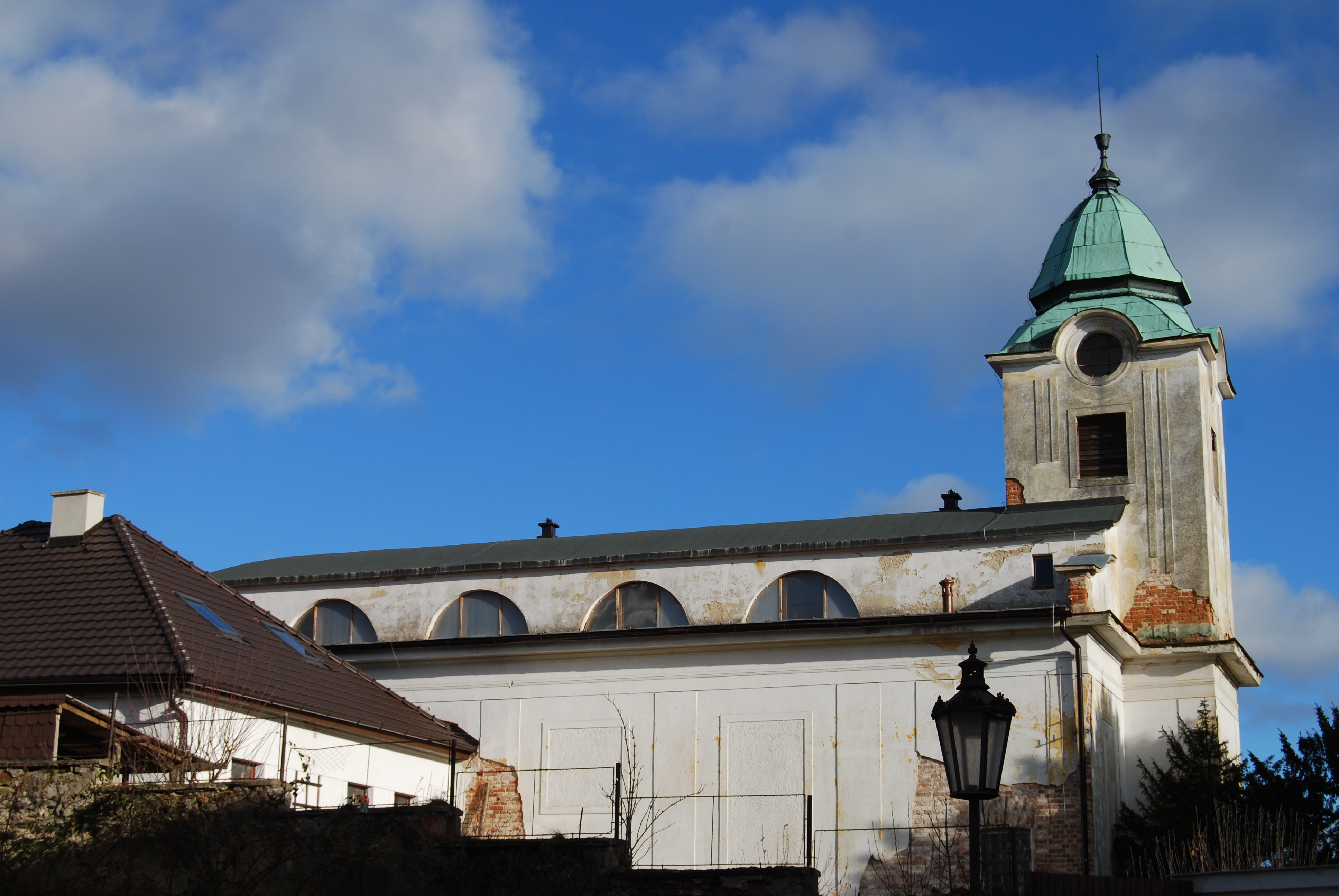 Kostel československý husitský. Chotoviny v okrese Tábor v Jihočeském kraji. Česká republika. - Google Maps - Google Earth